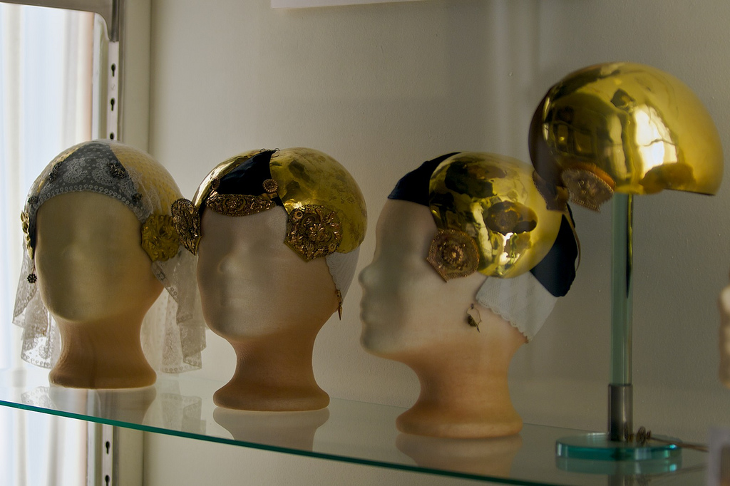 Reeks oorijzers, zilver, goud en verguld, periode 1830-1870 12028, Reeks oorijzers, zilver, goud en verguld, periode 1830-1870